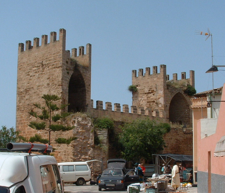 Puerta de la muralla de Alcudia